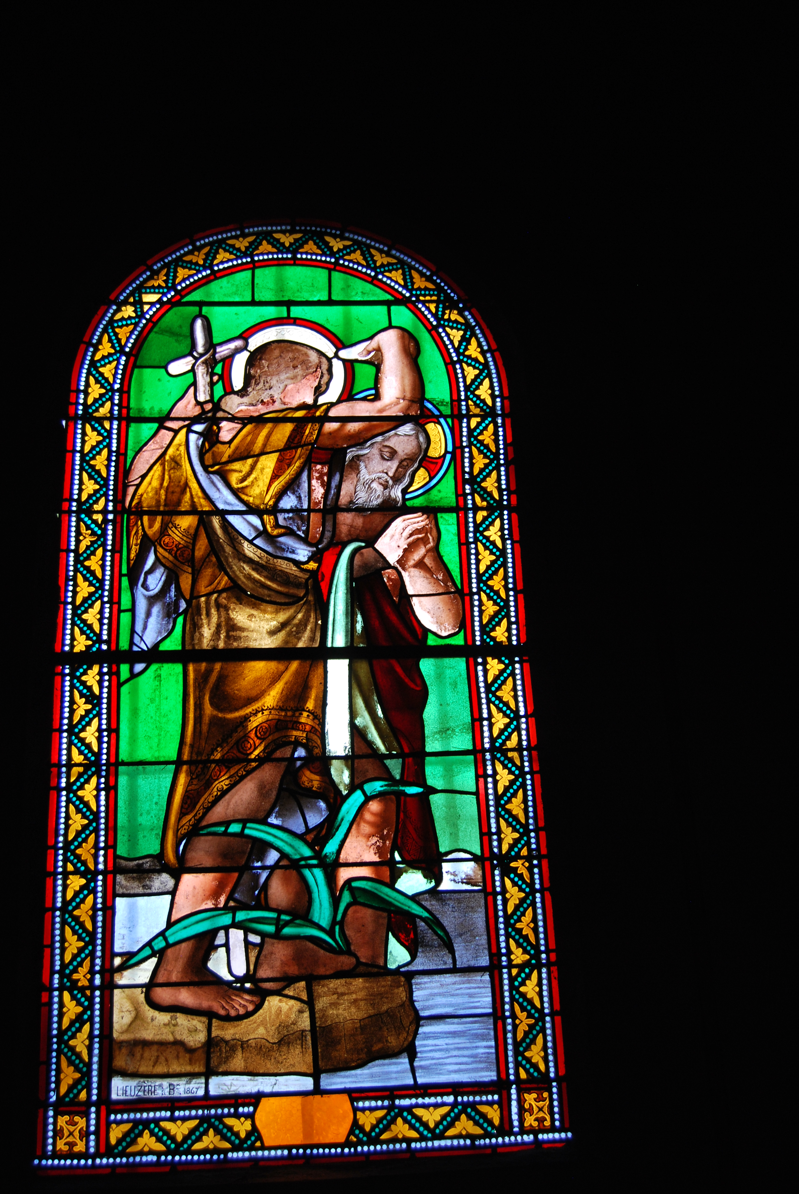 Ambares-et-Lagrave (Gironde) église St Pierre